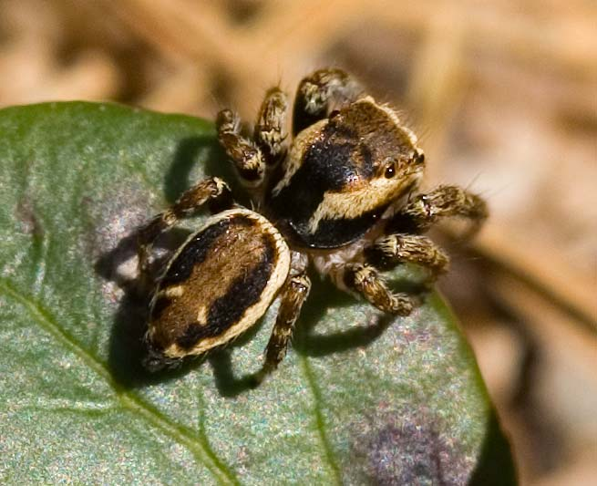 Evarcha falcata, adult male